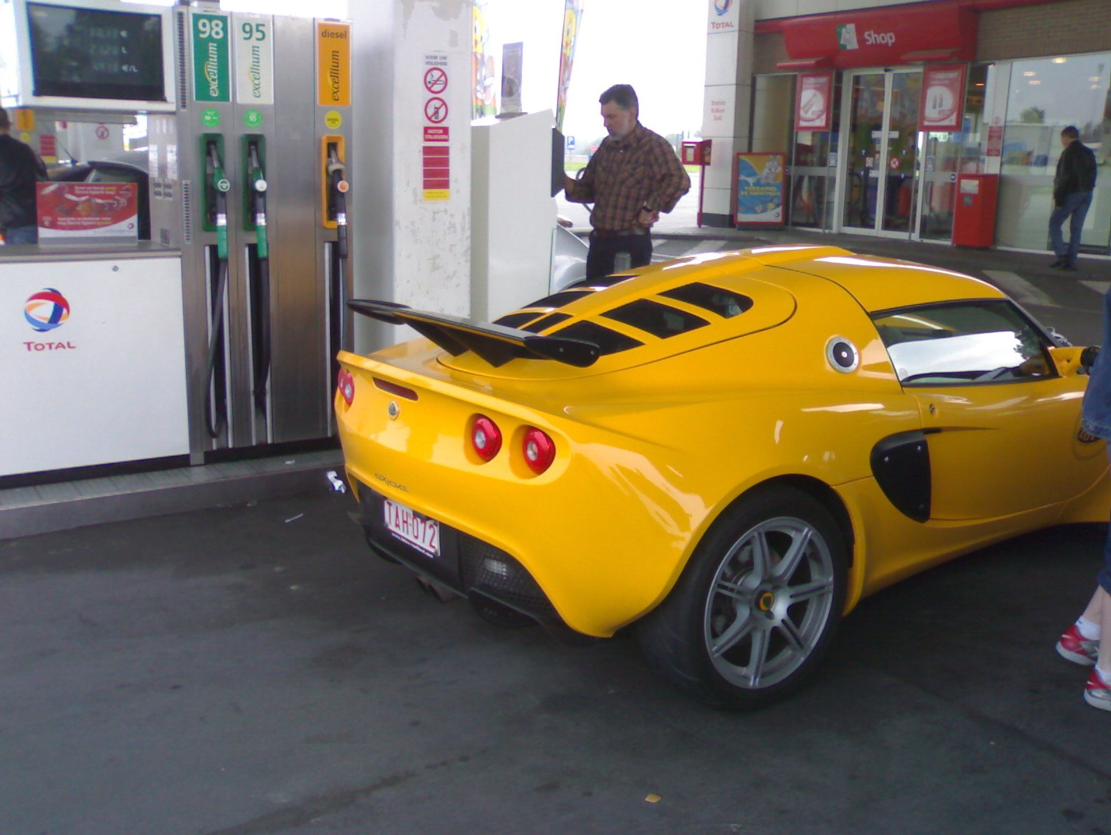 Lotus Exige